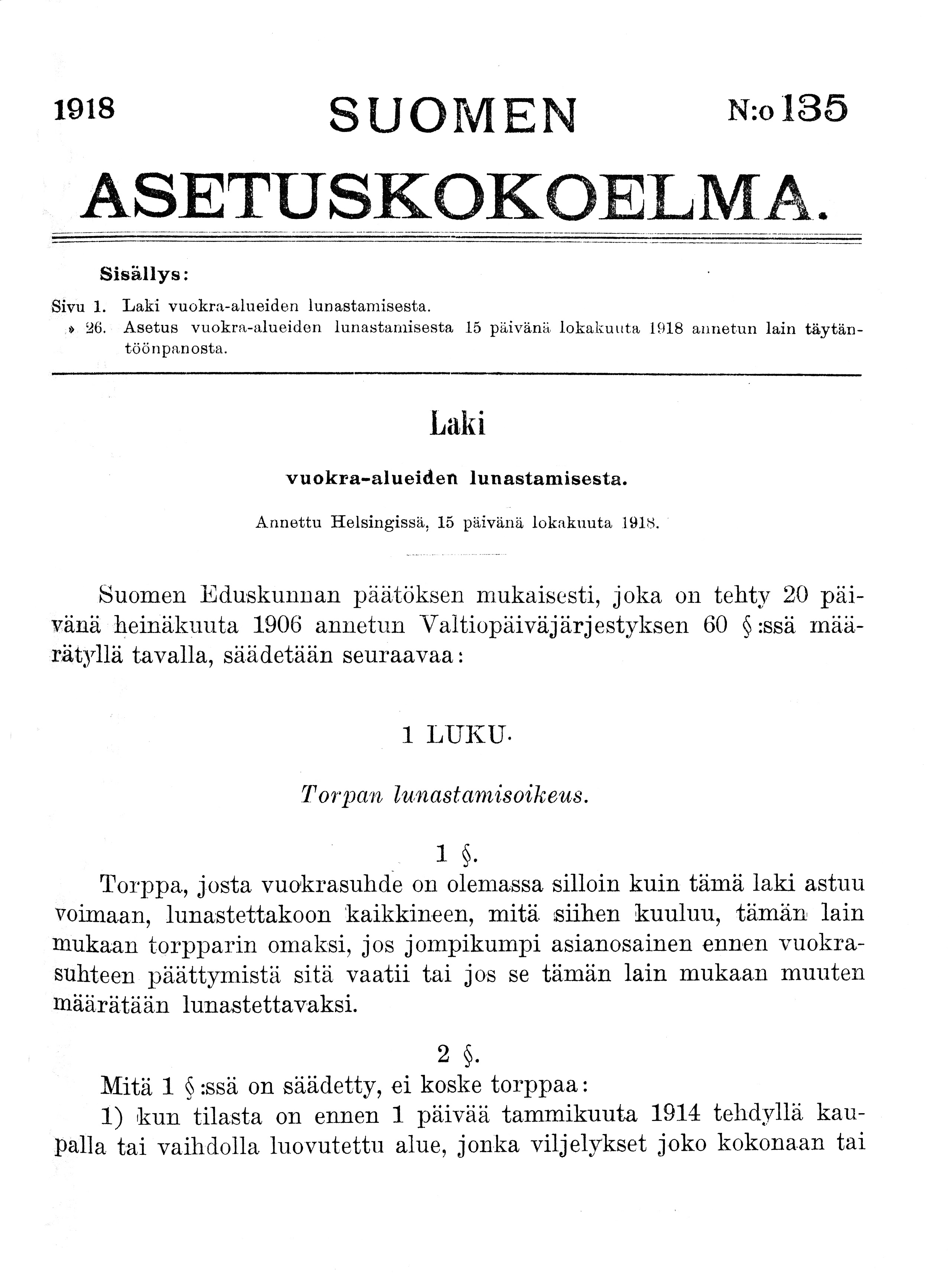 Ns. torpparilain 1. sivu Suomen Asetuskokoelmassa 135/1918.